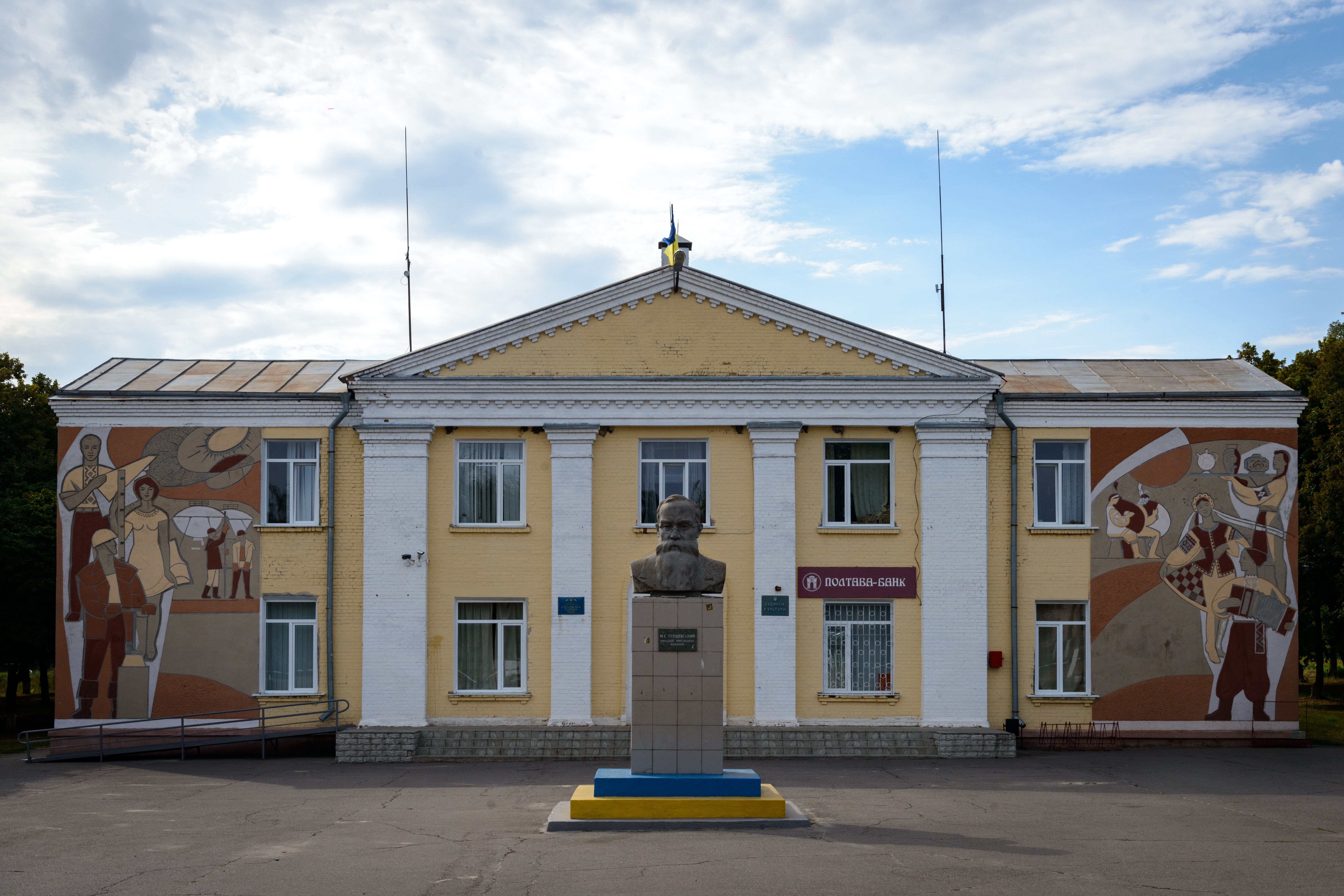 Пам’ятник-погруддя М.С.Грушевському., Гоголеве смт, центр.